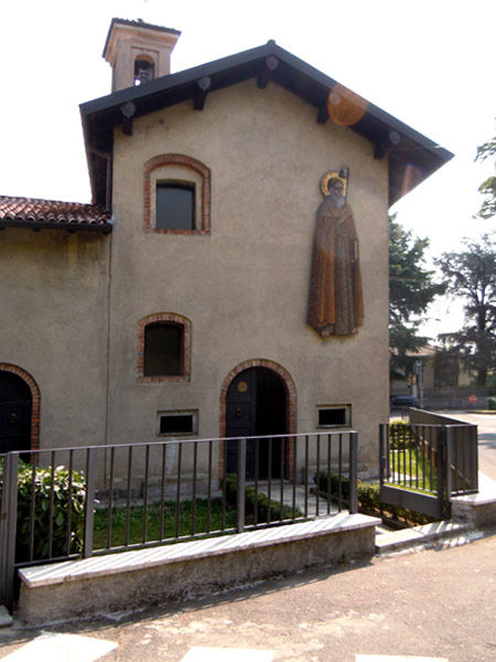 Chiesa di S. Antonio a Saronno